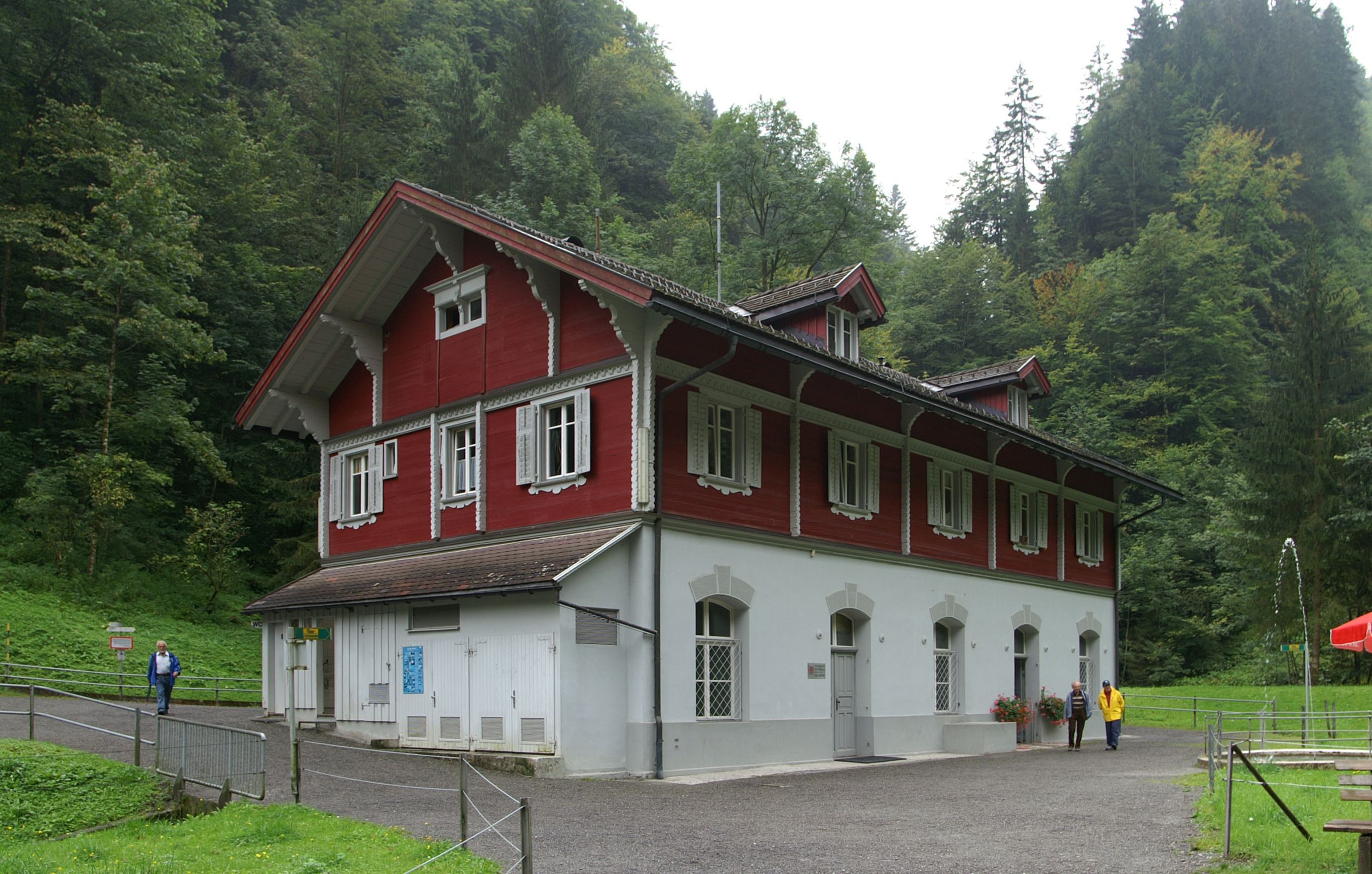 Kraftwerk Ebensand der Vorarlberger Kraftwerke am Staufensee in Dornbirn, Vorarlberg